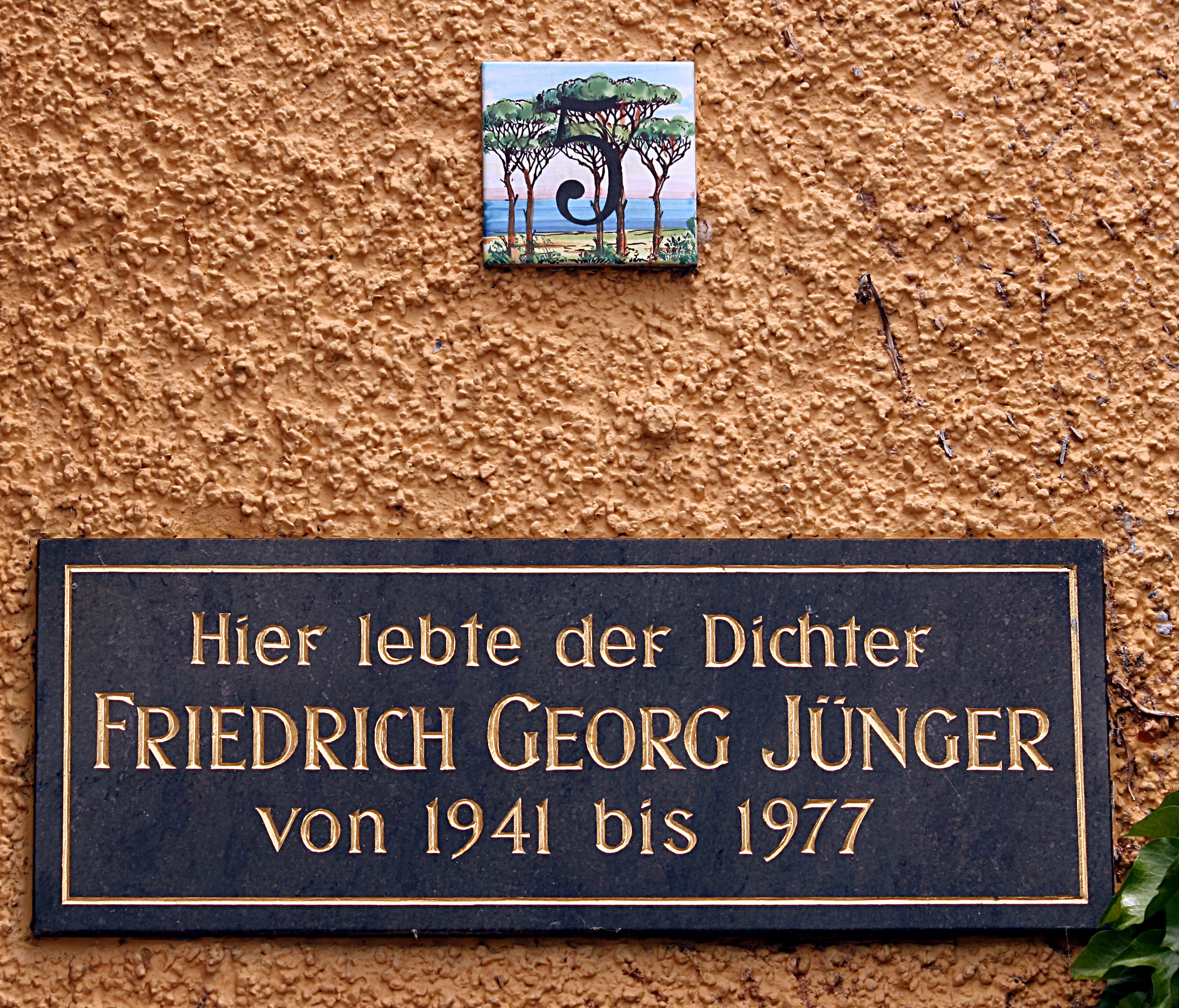 Überlingen,_Tafel_am_Jüngerwohnhaus_an_der_Promenade